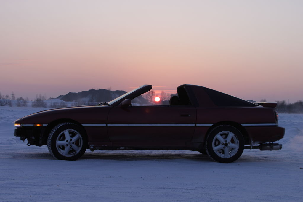 toyota supra targa(sport roof) 1988 песчанка красноярск 2012